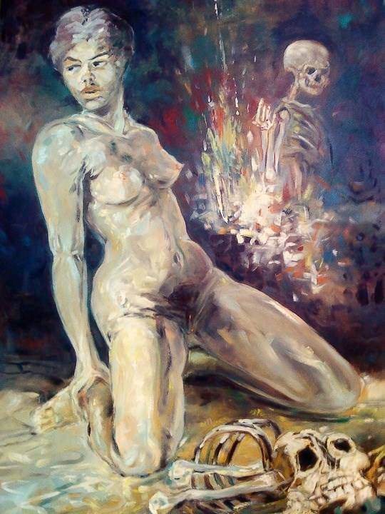 AIDS’’ -rok 1998, 105x70, olej na płótnie, fotografia Marek Kubski